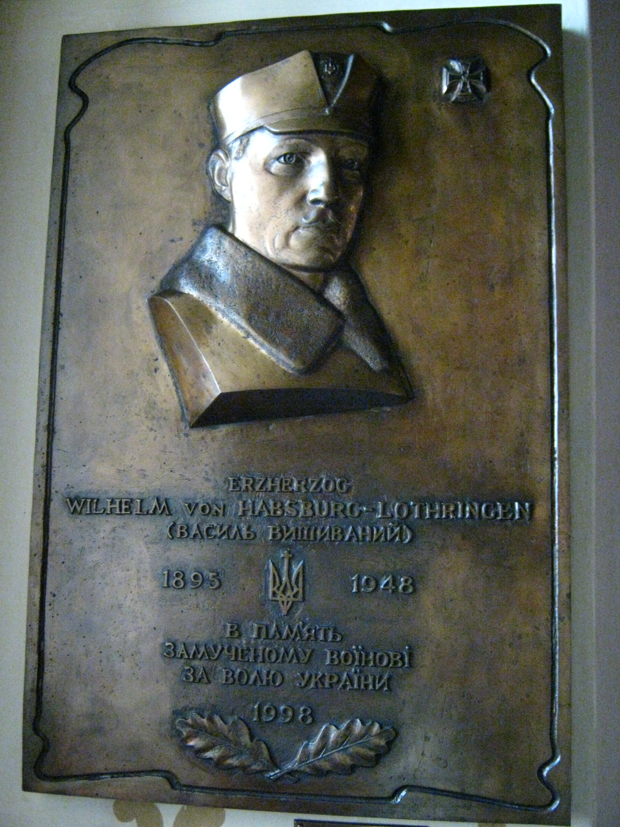 Wilhelm von Habsburg/Vasyl Vyshyvanyi memorial plaque